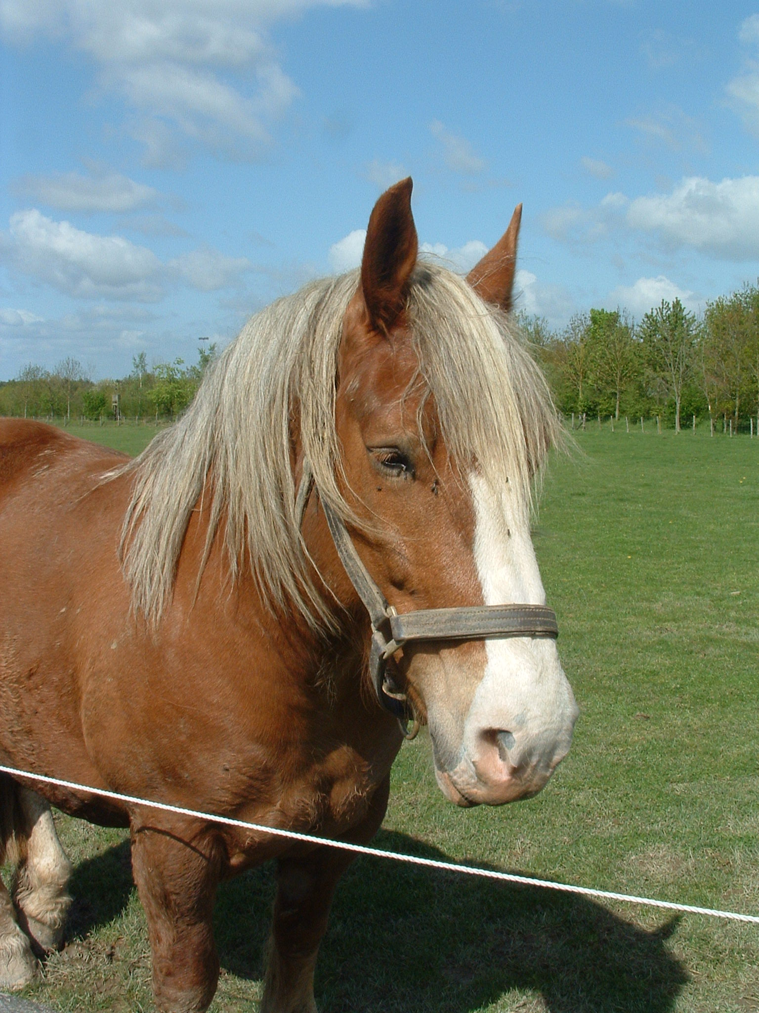 Tête d'une jument postier breton à l'écomusée du pays de Rennes, Ferme de la Bintinais, Rennes, France